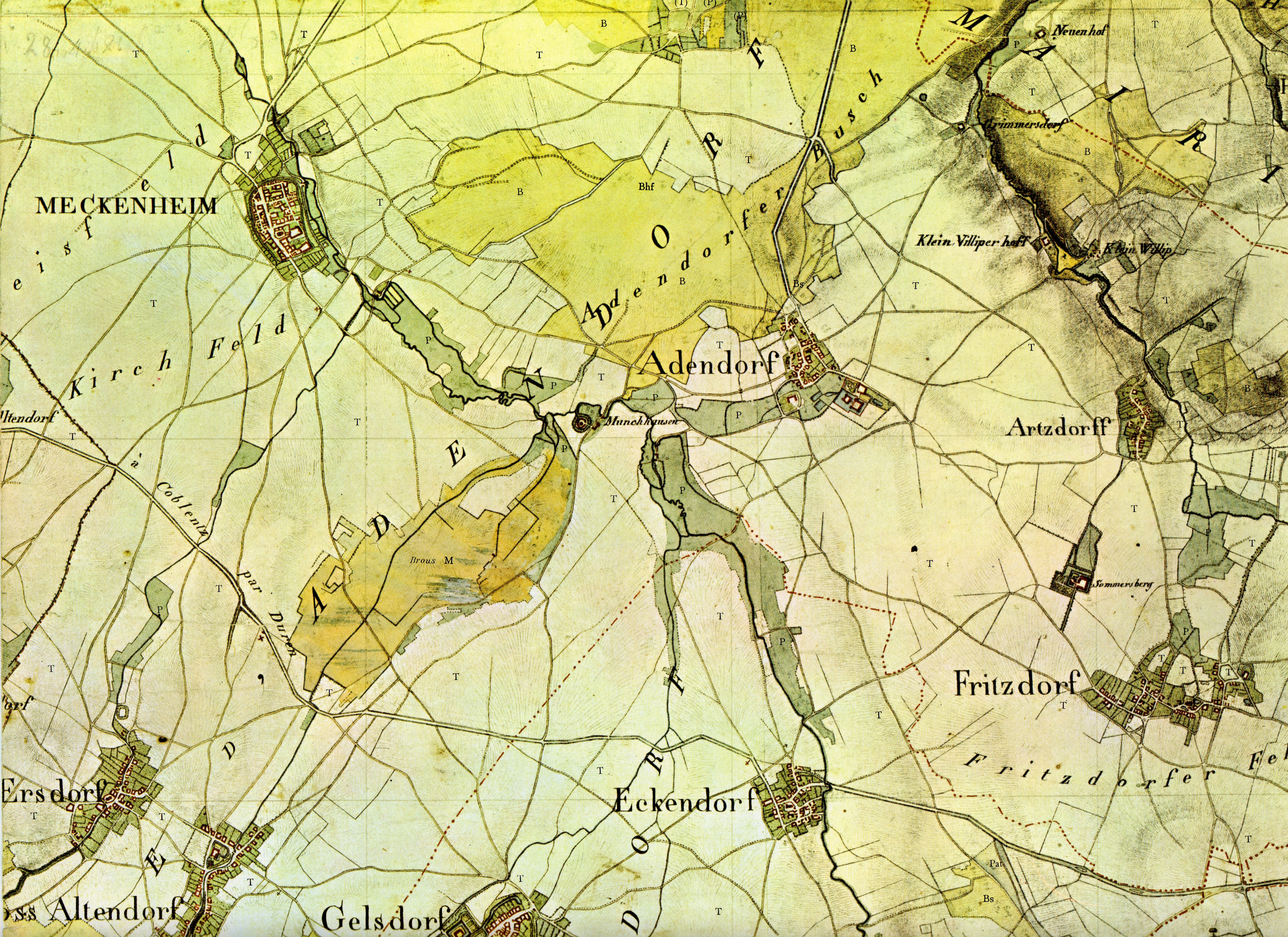 Kartenaufnahme der Rheinlande durch Tranchot und von Müffling 1803-1820 Blatt 111 - Ahrweiler